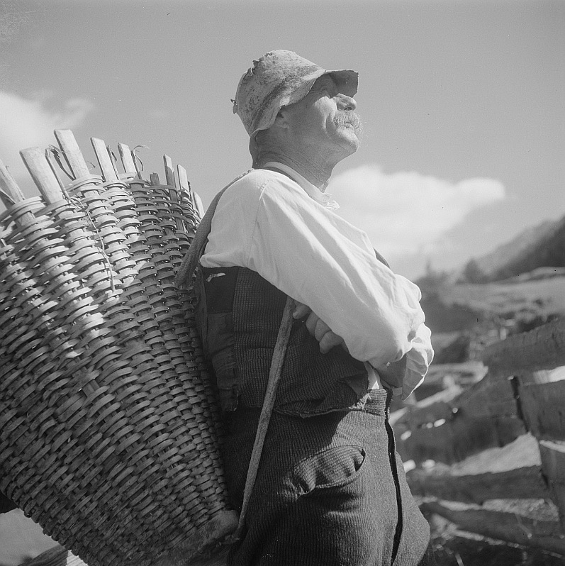 Original image description from the Deutsche Fotothek Mann mit Kiepe bei Innsbruck